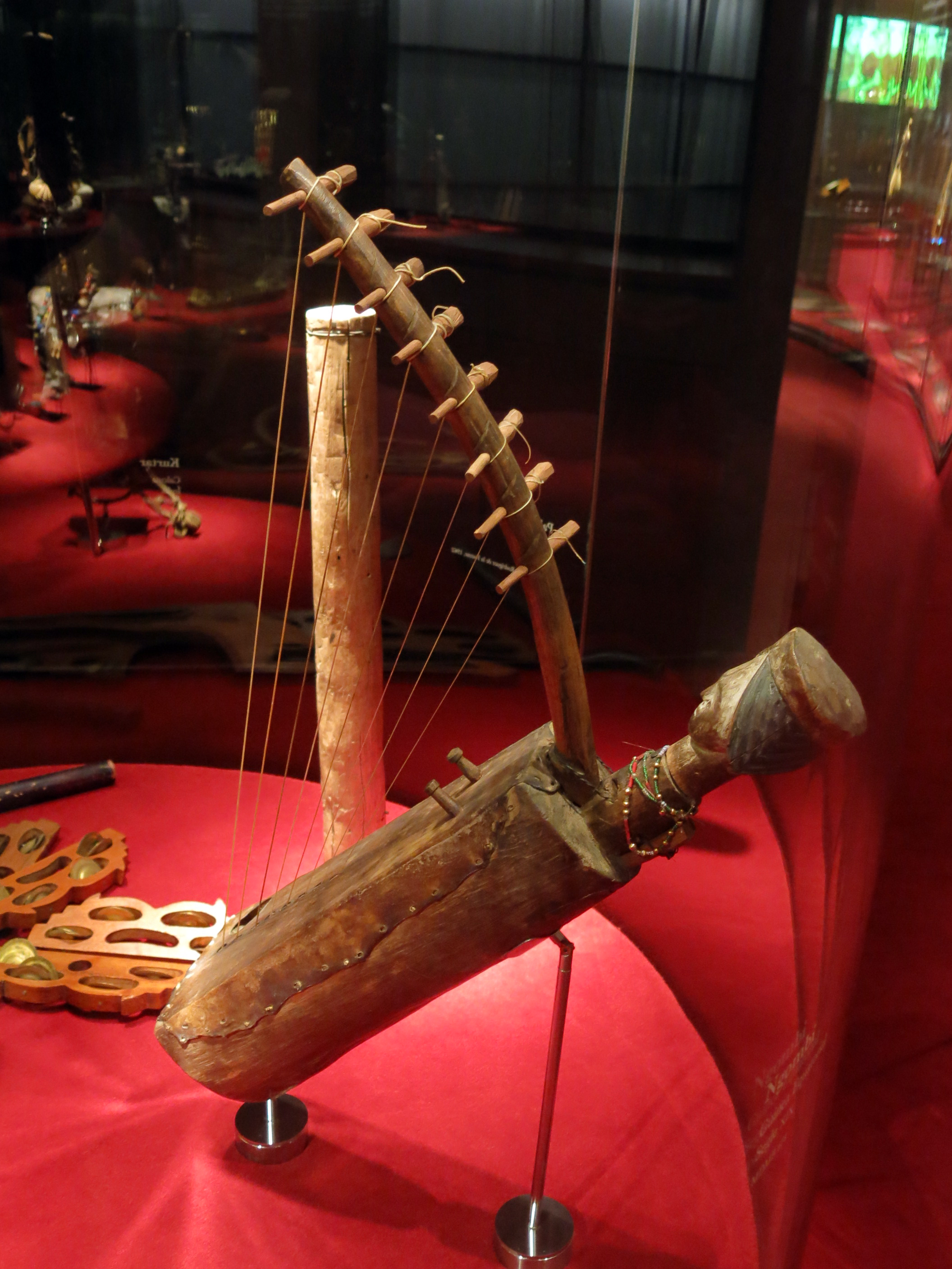 Ngombi. Guinea Equatorial. Primera meitat segle XX. Museu de la Música de Barcelona. (MDMB 390).